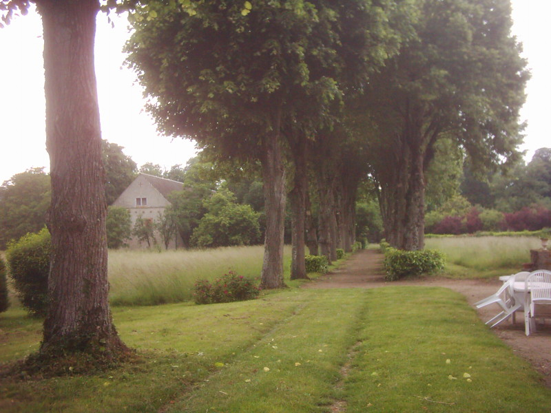 Allée qui mène après le portail à l'emplacement de l'ancienne abbaye de La Guiche, avec sur la gauche, la grange, seul bâtiment subsistant. .